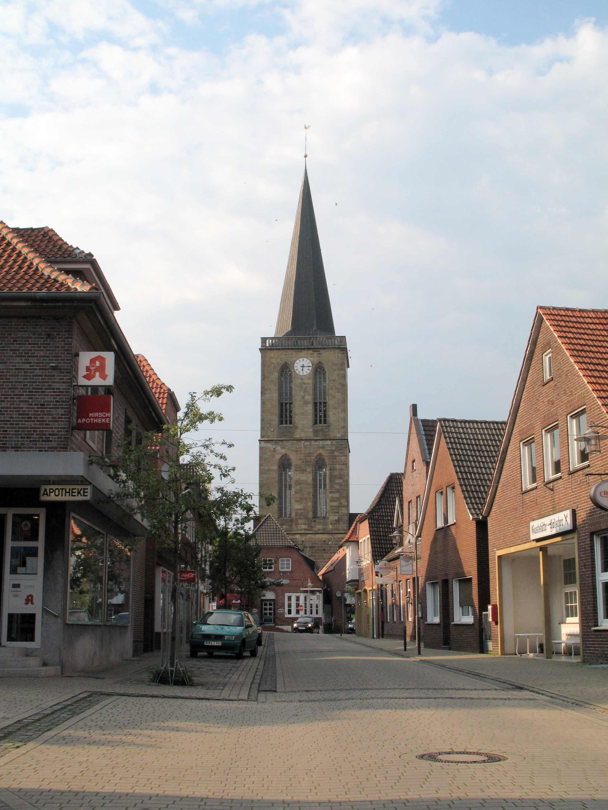 Emsbüren, St.-Andreaskirche